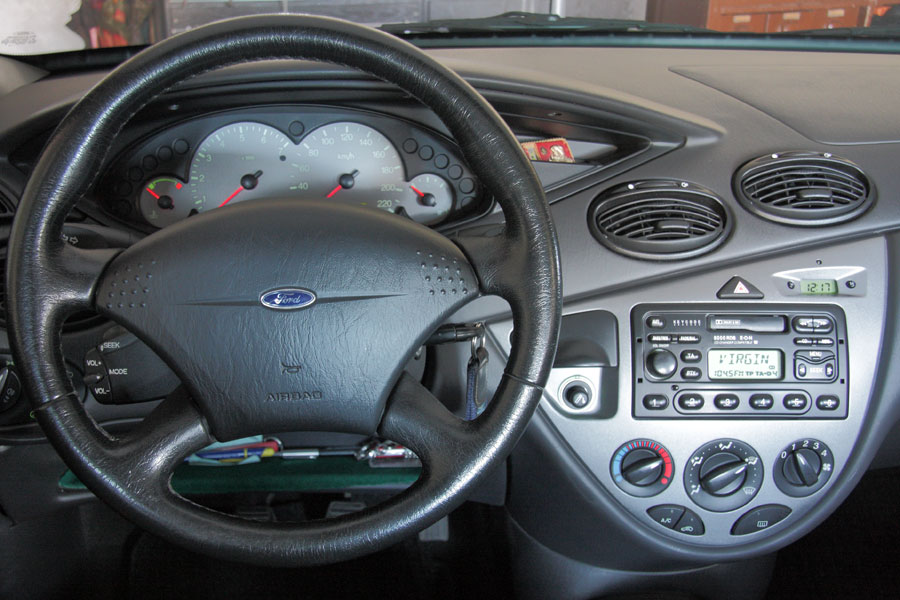 Cruscotto di una Ford Focus prima serie allestimento Zetec (anno 2000)